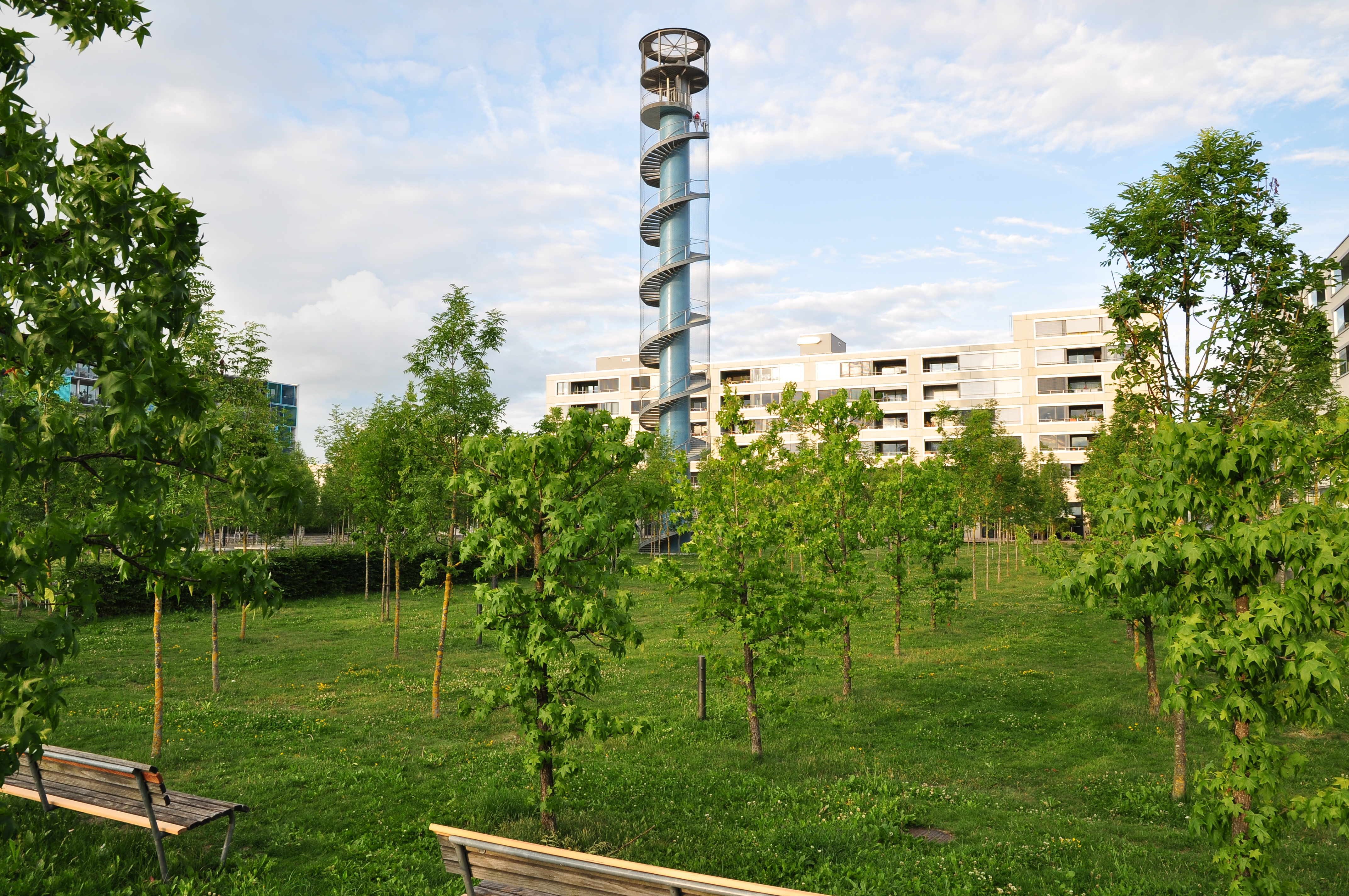 Oerlikerpark, Zürich-Oerlikon (Zürich-Nord, Switzerland)